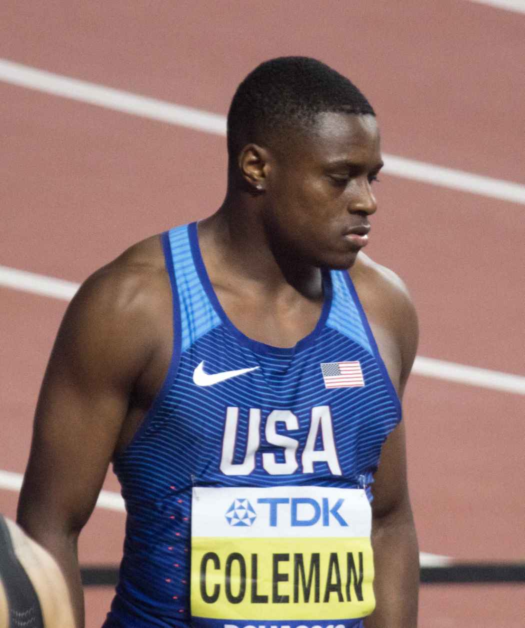 DOH20281 coleman